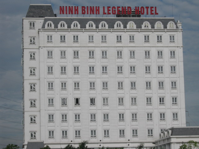 Khách sạn Ninh Bình huyền thoại, thành phố Ninh Bình